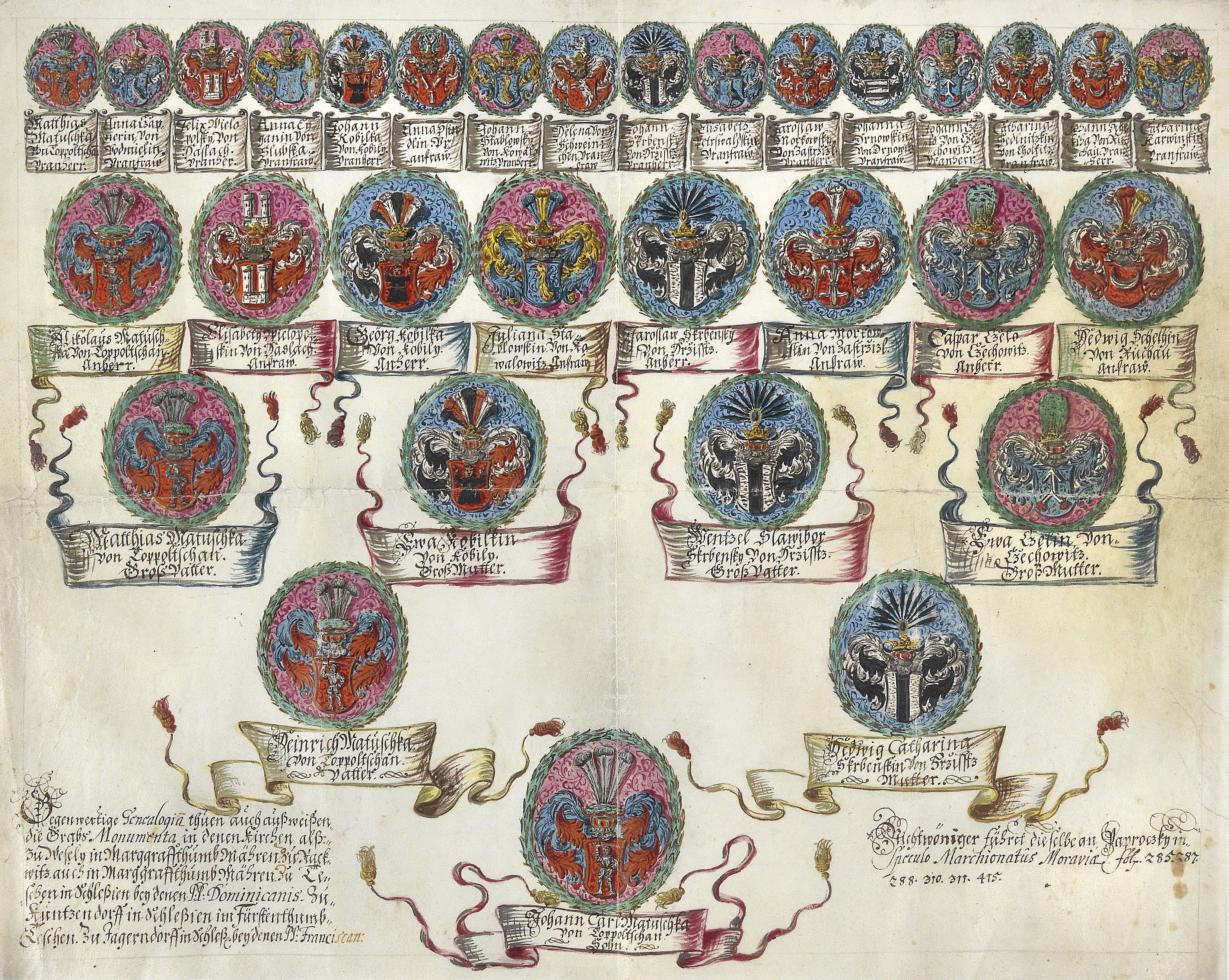 Ahnenprobe des Heinrich Matuschka von Topolczan, Obristwachtmeister und Landeshauptmann des Fürstentums Jegerndorf; Mitte 17. Jh., Aquarell- und Deckfarben auf Pergament, gerollt, 39,5 x 49 cm